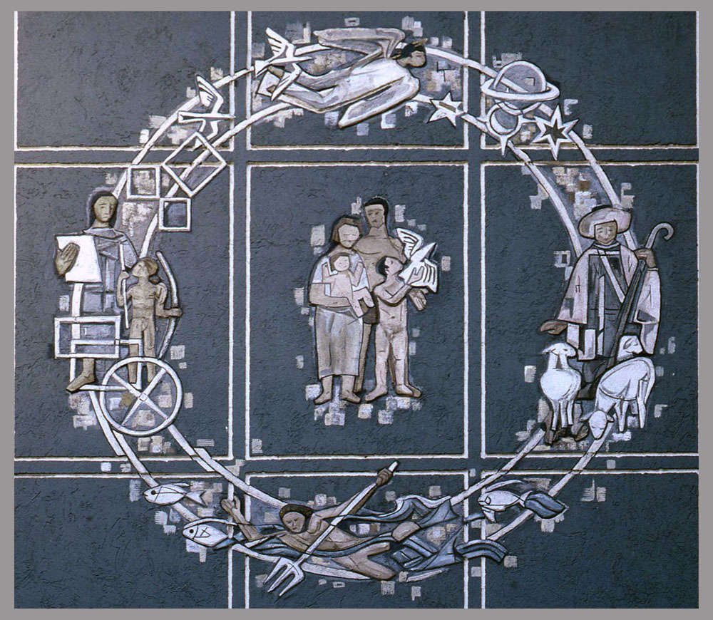 Künstler: Hans Wagner